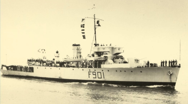 Le F901 Georges Lecointe (II) (ex-HMSC Wallaceburg J336) : dragueur de mines belge de classe Algerine